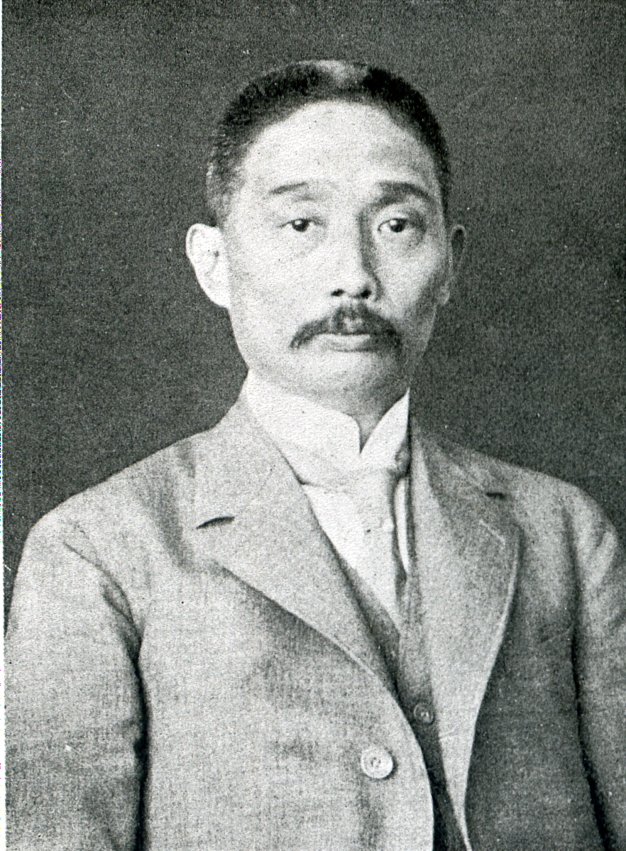 この写真は、志賀和多利（1874-1945）の写真です。